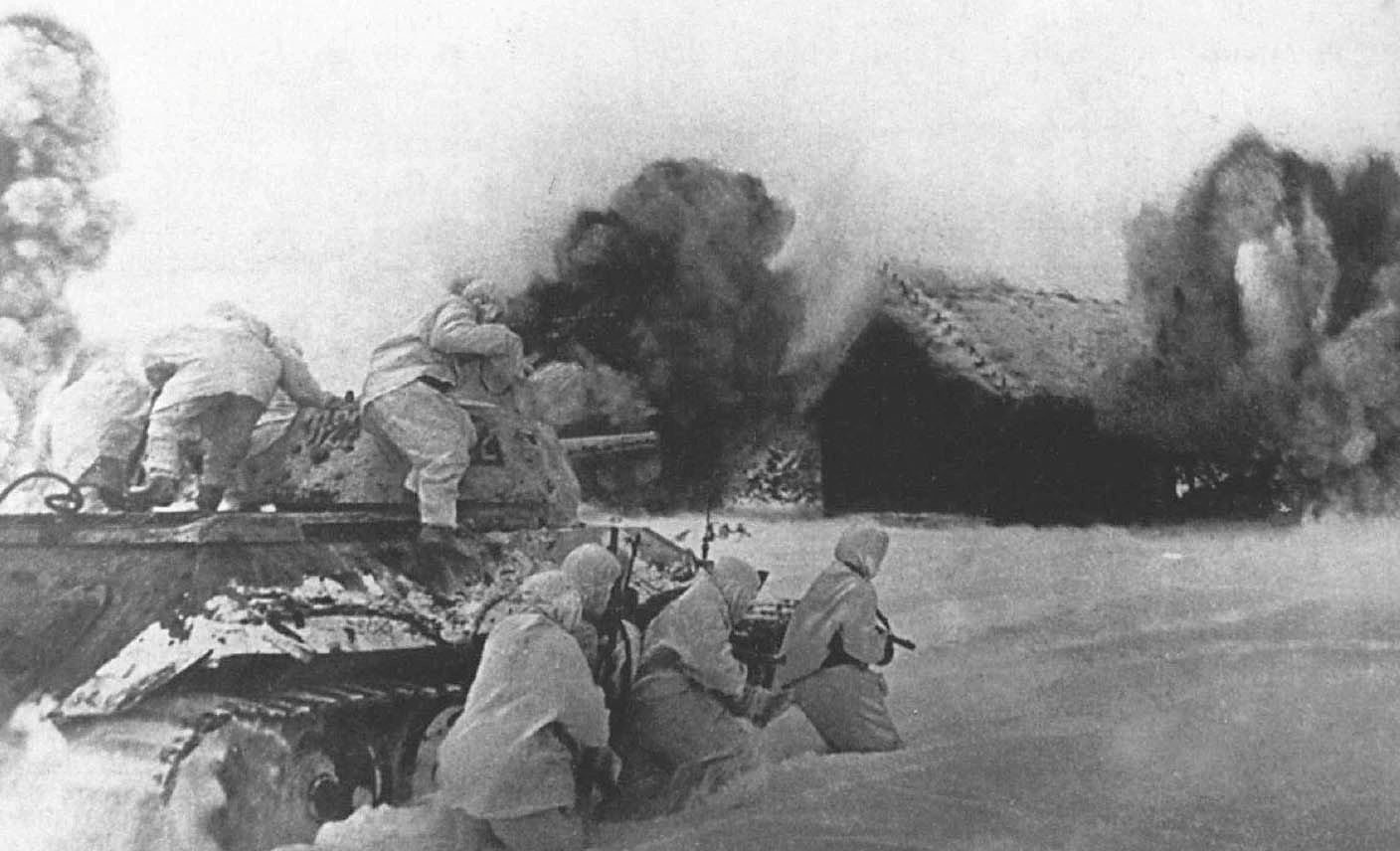 Советский танковый десант при поддержке танка Т-34 атакует занятую противником деревню, в которой видны разрывы огневого вала. Западный фронт, декабрь 1941.